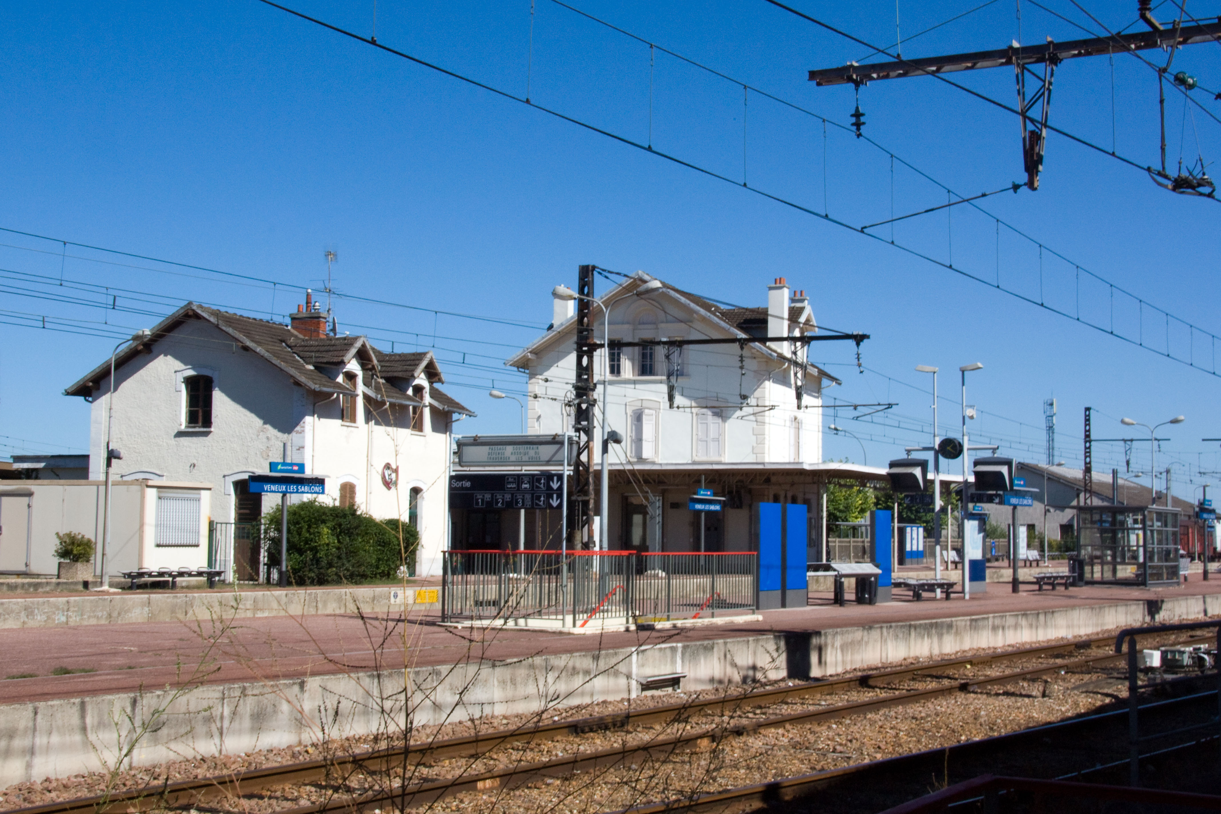 Gare de Moret - Veneux-les-Sablons, Veneux-les-Sablons, Seine-et-Marne, France